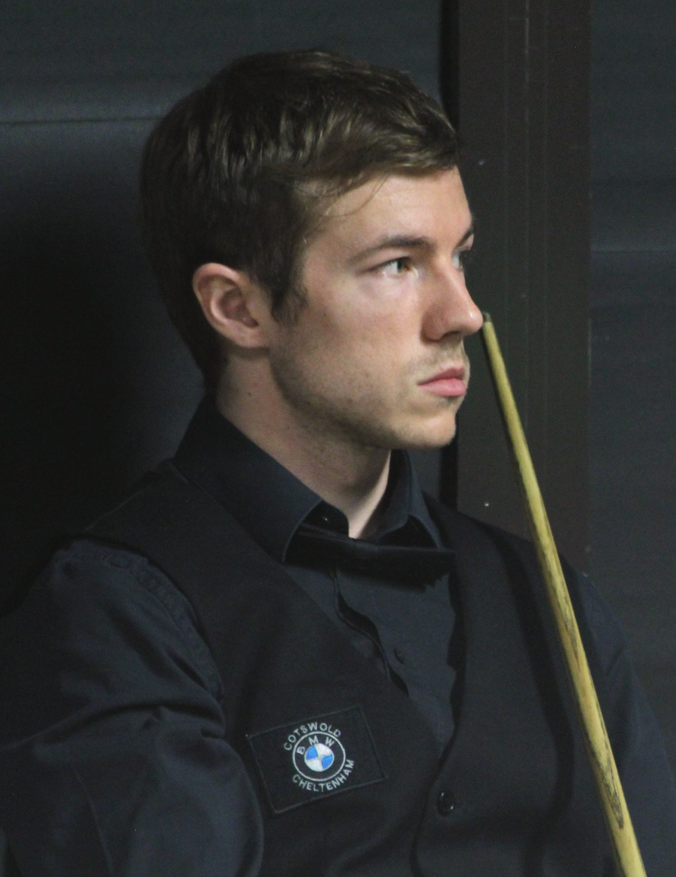 Jack Lisowski beim Paul Hunter Classic 2016